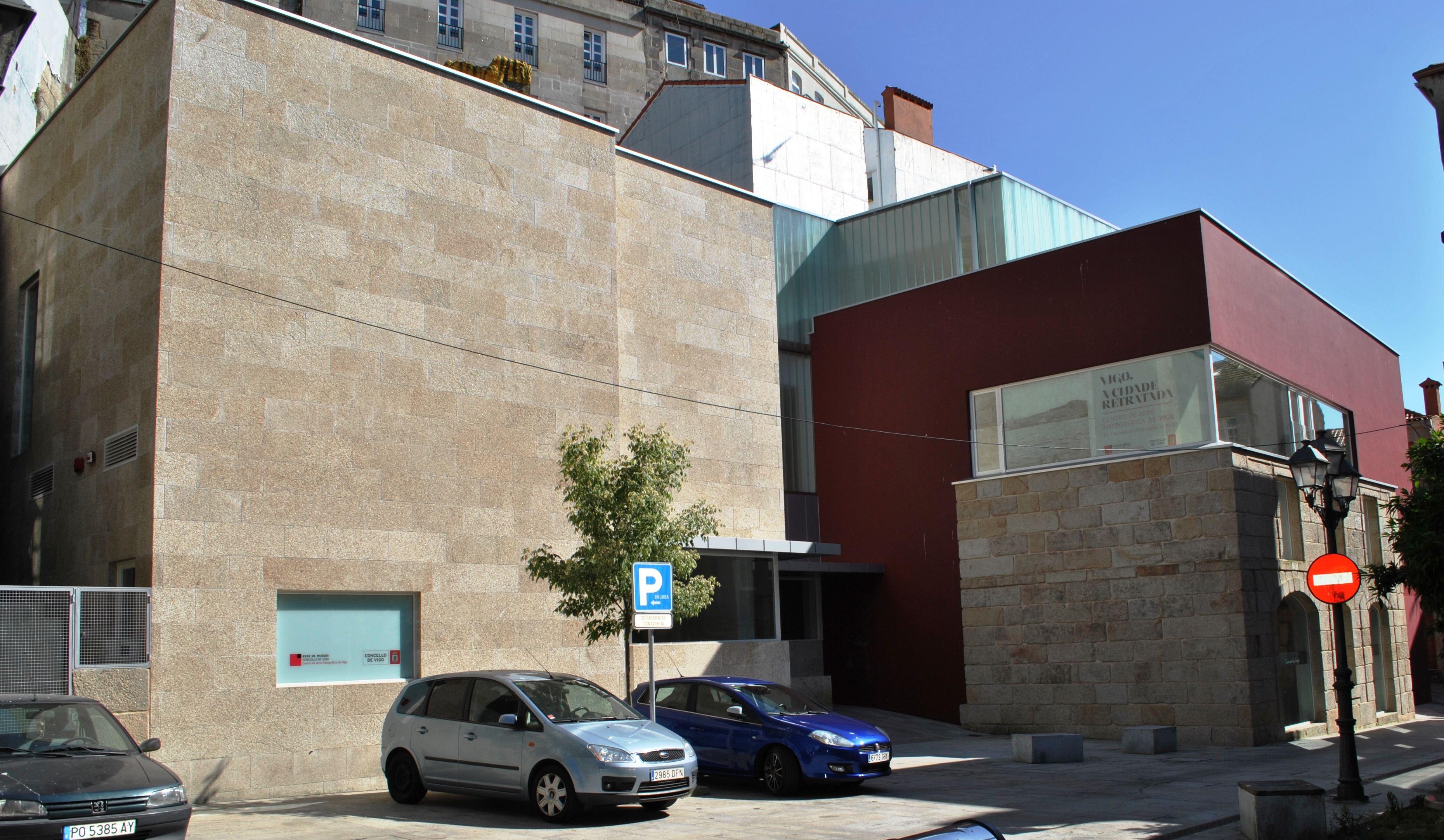 Véxase o título e as categorías.